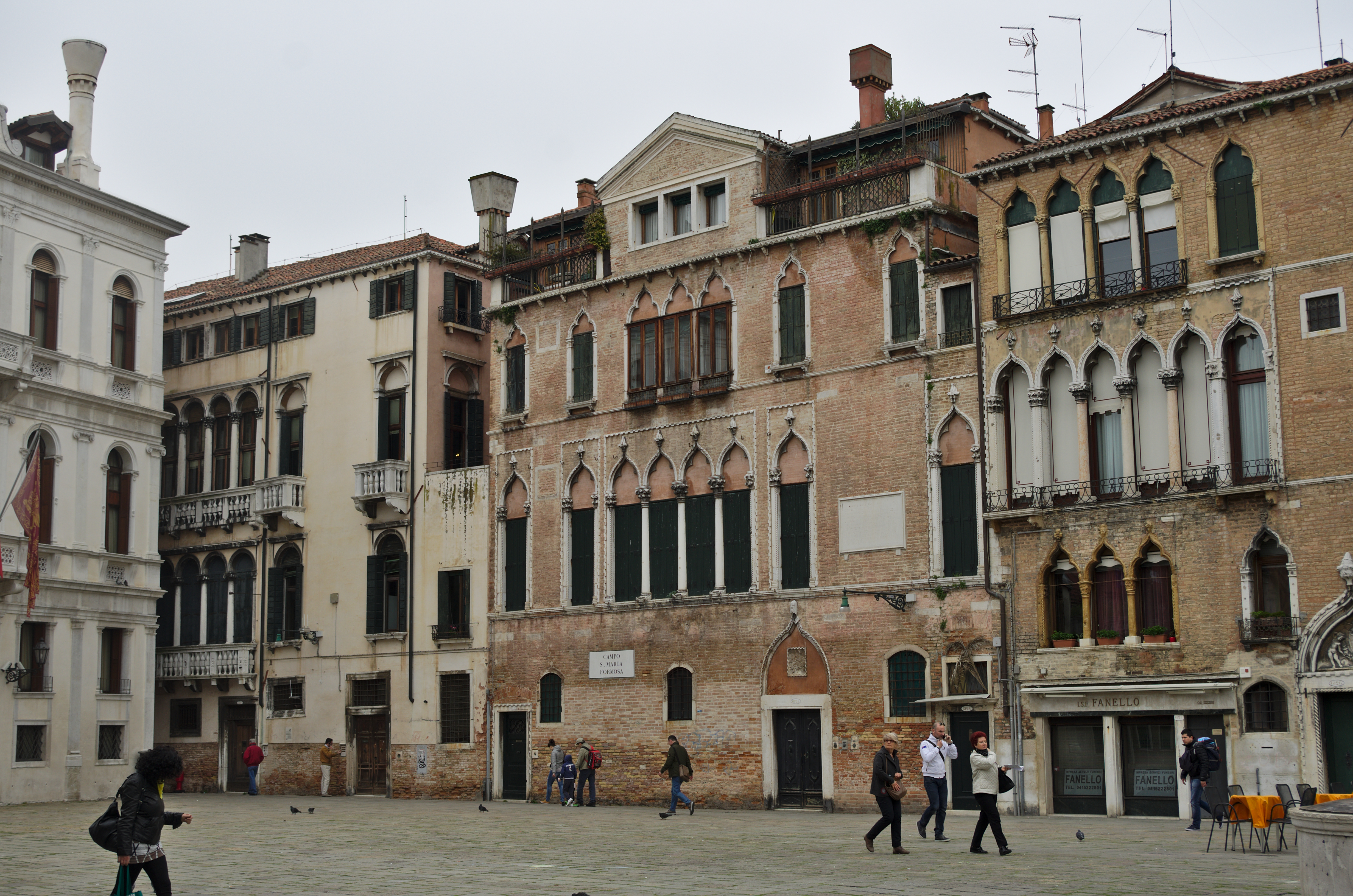 Venise - 20140403